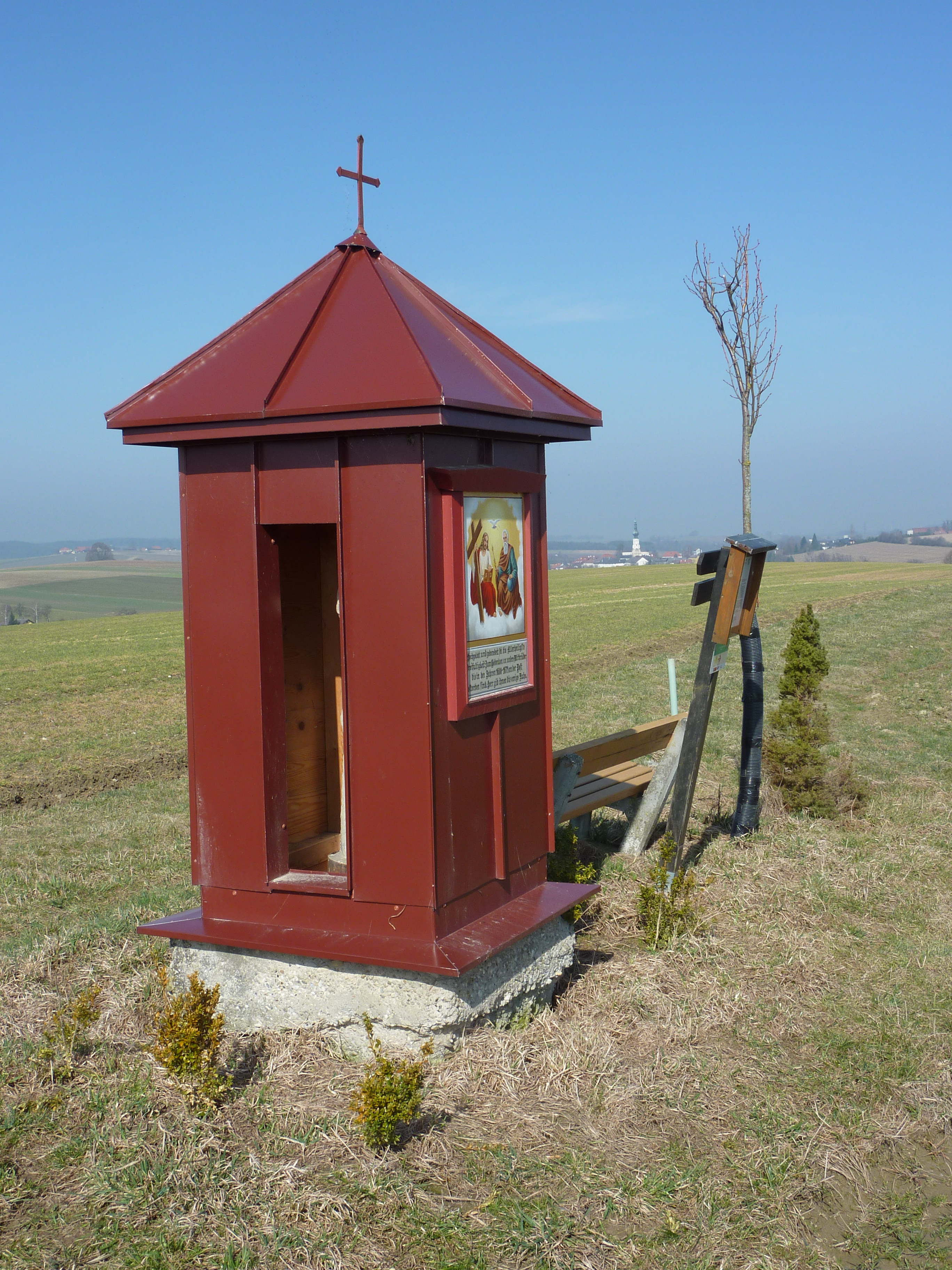 Sogenannte Rote Kapelle, Obermigelsbach, Kappeln, Aspach, Oberösterreich